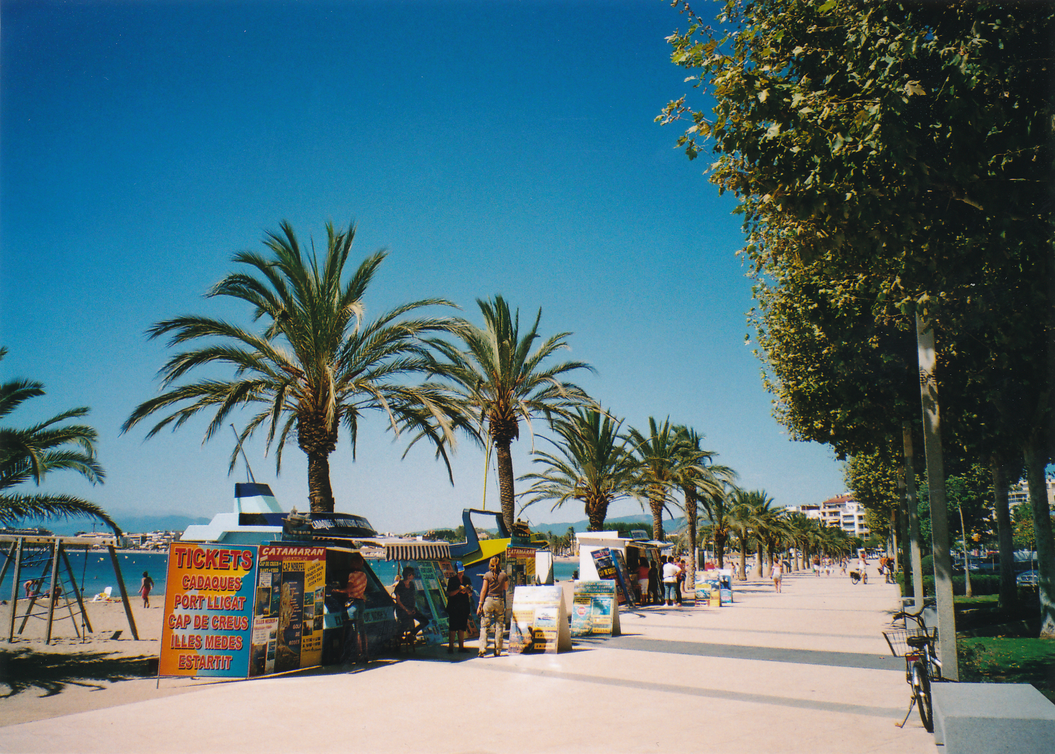 Die Palmenpromenade von Roses Datum: 09/2009 Urheber: Michael Pfeiffer Quelle: privates Fotoalbum des Urhebers